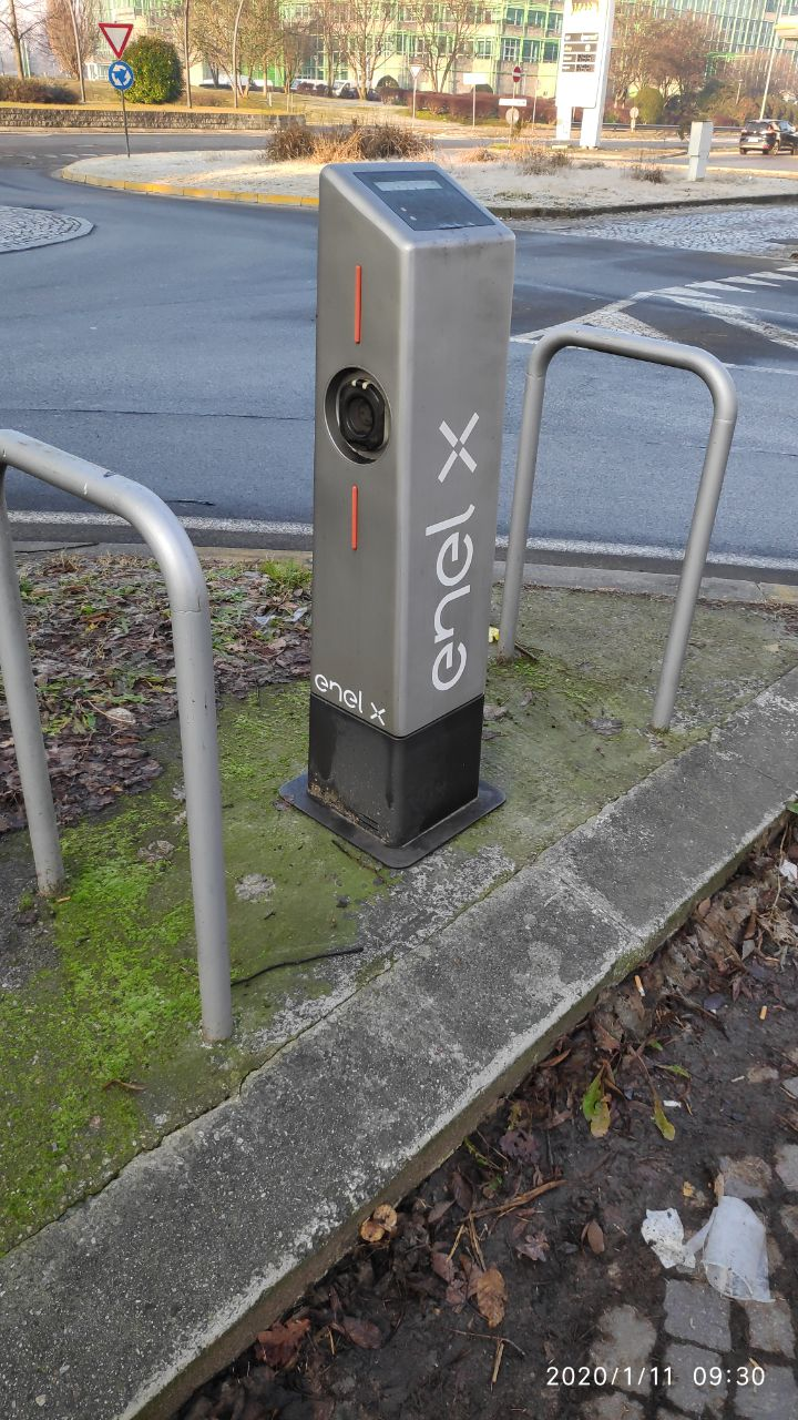 Ricarica elettrica di Enel X a San Donato Milanese (Gennaio 2020)